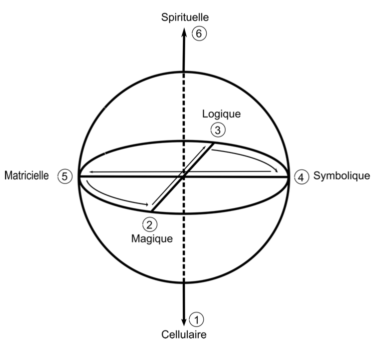 Application de la Structure absolue aux niveaux de conscience.